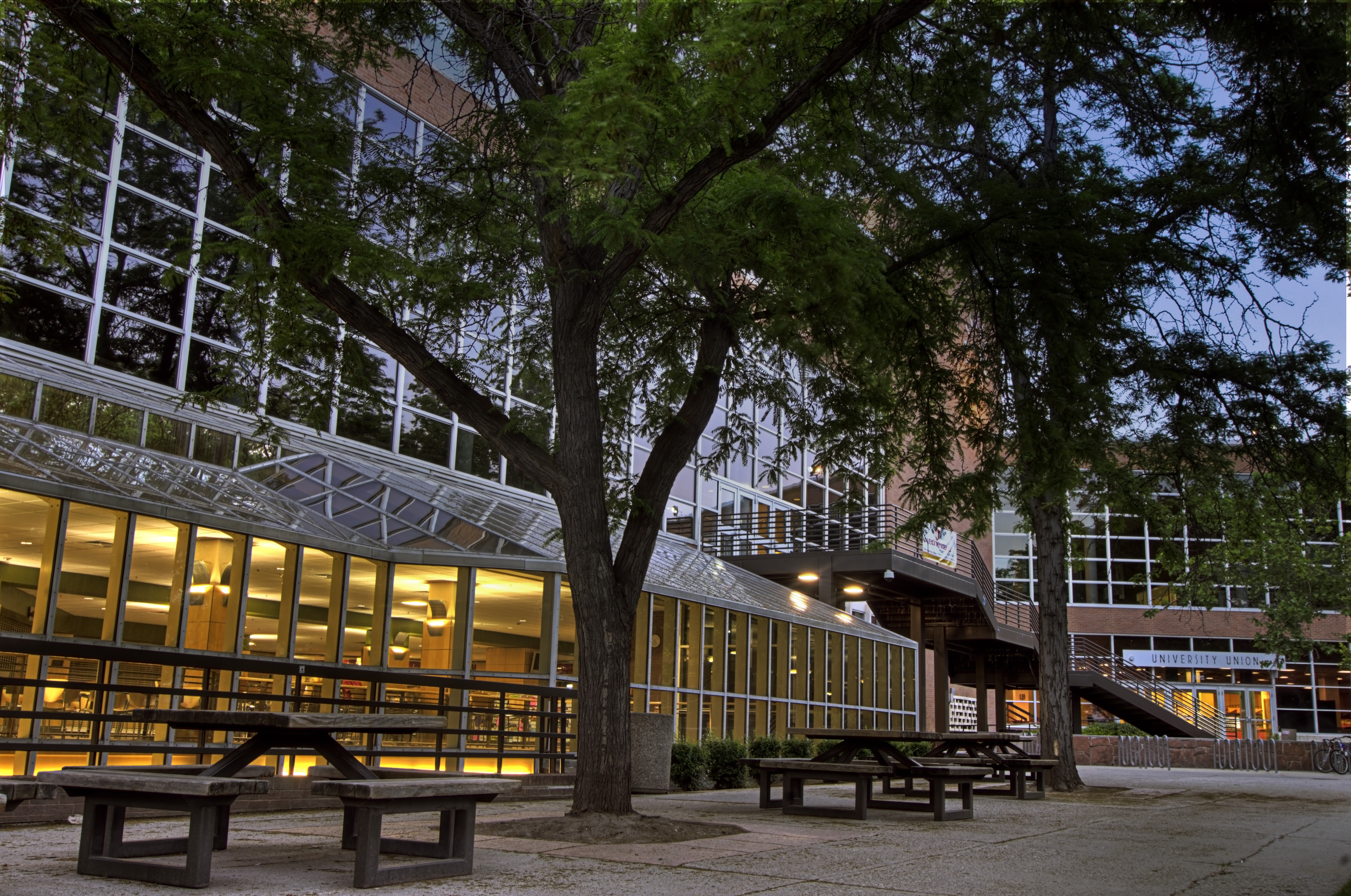 食堂